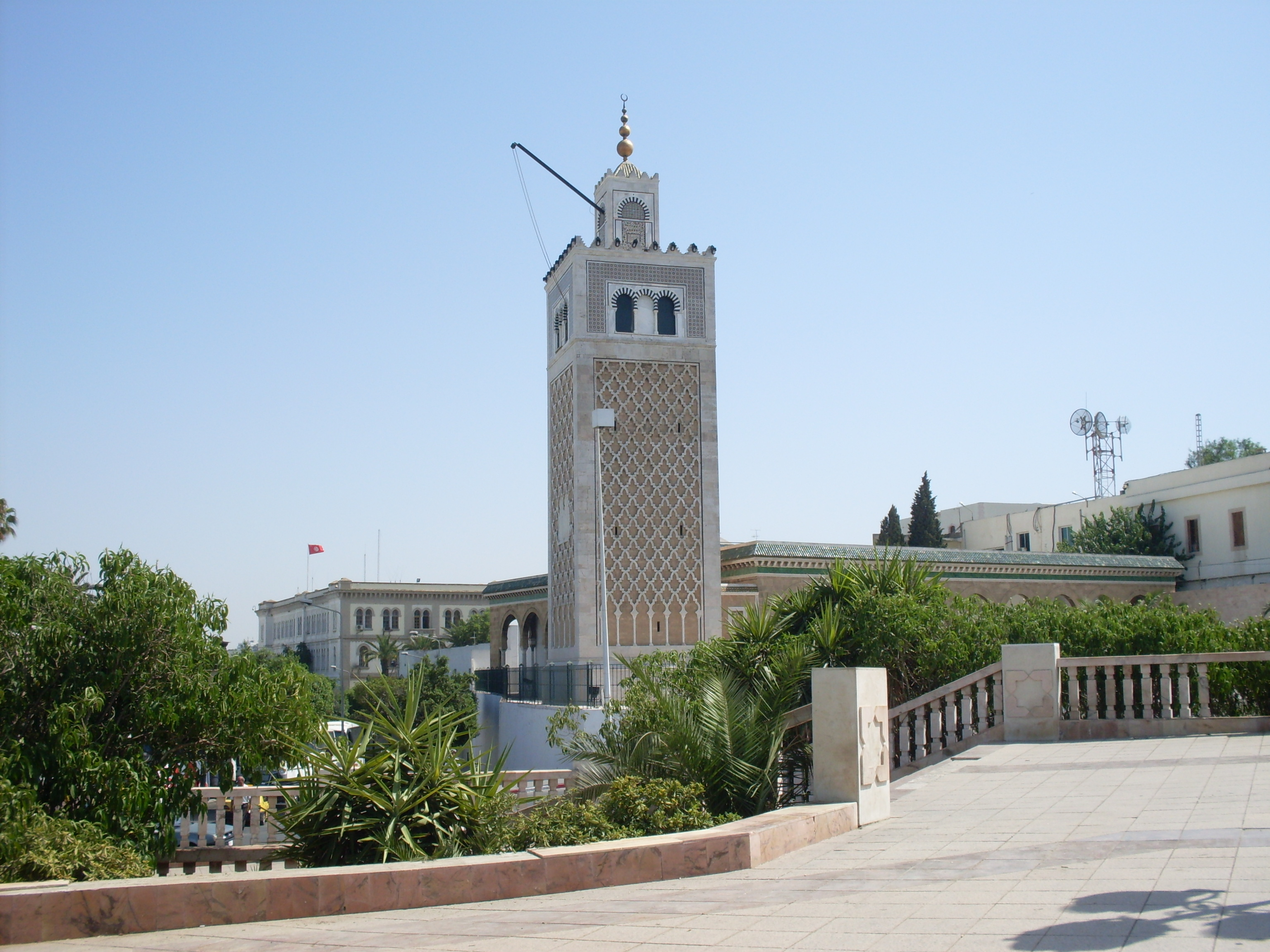 Medina de Tunis Mosquée de Kasbah